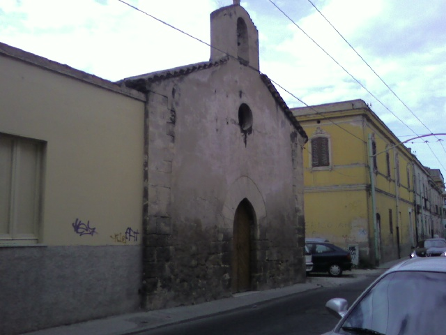 Foto personale scattata, Domenica 23 settembre 2007 con cellulare Samsung SGH-Z230, raffigurante la chiesetta di San Benedetto di Quartu Sant'Elena.